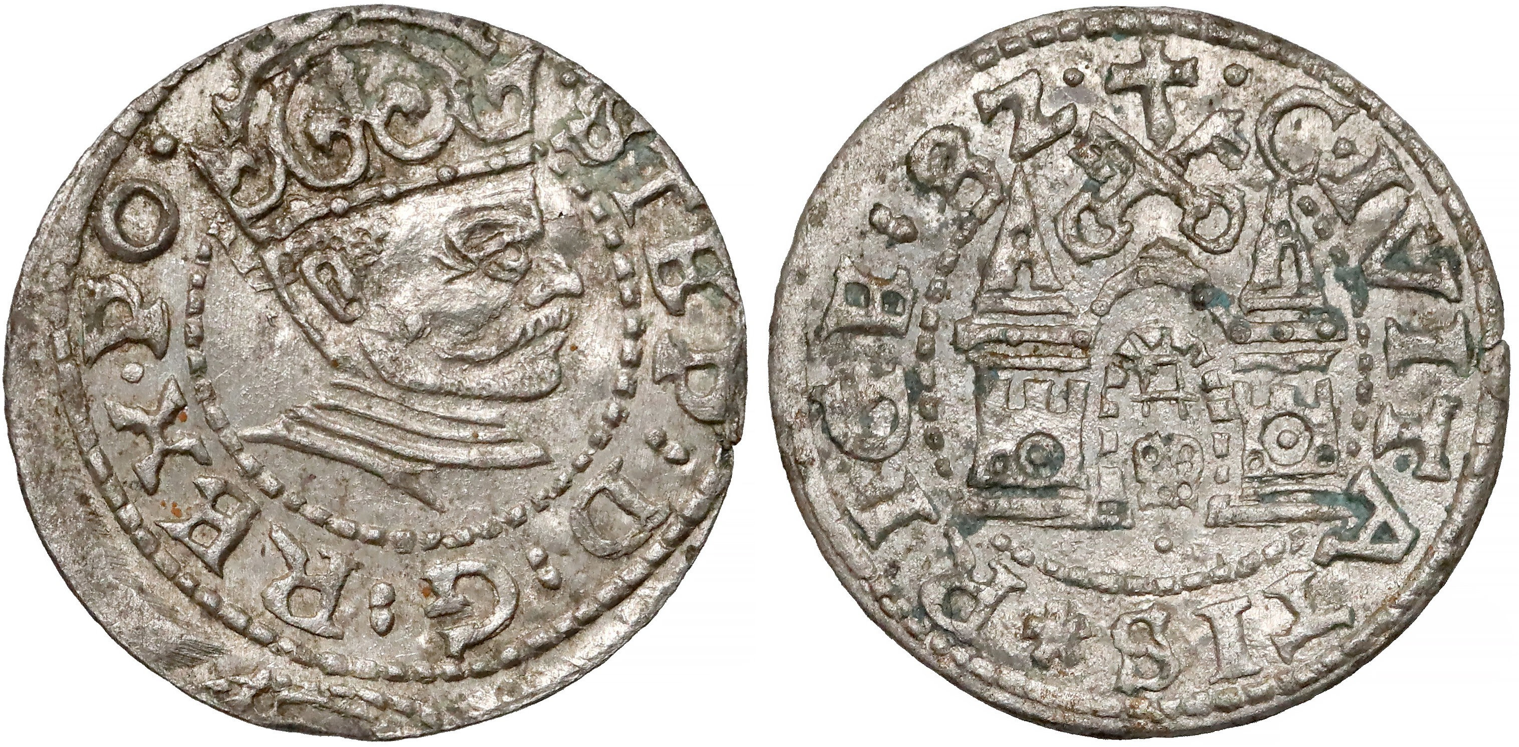 Denar miejski Ryga 1582